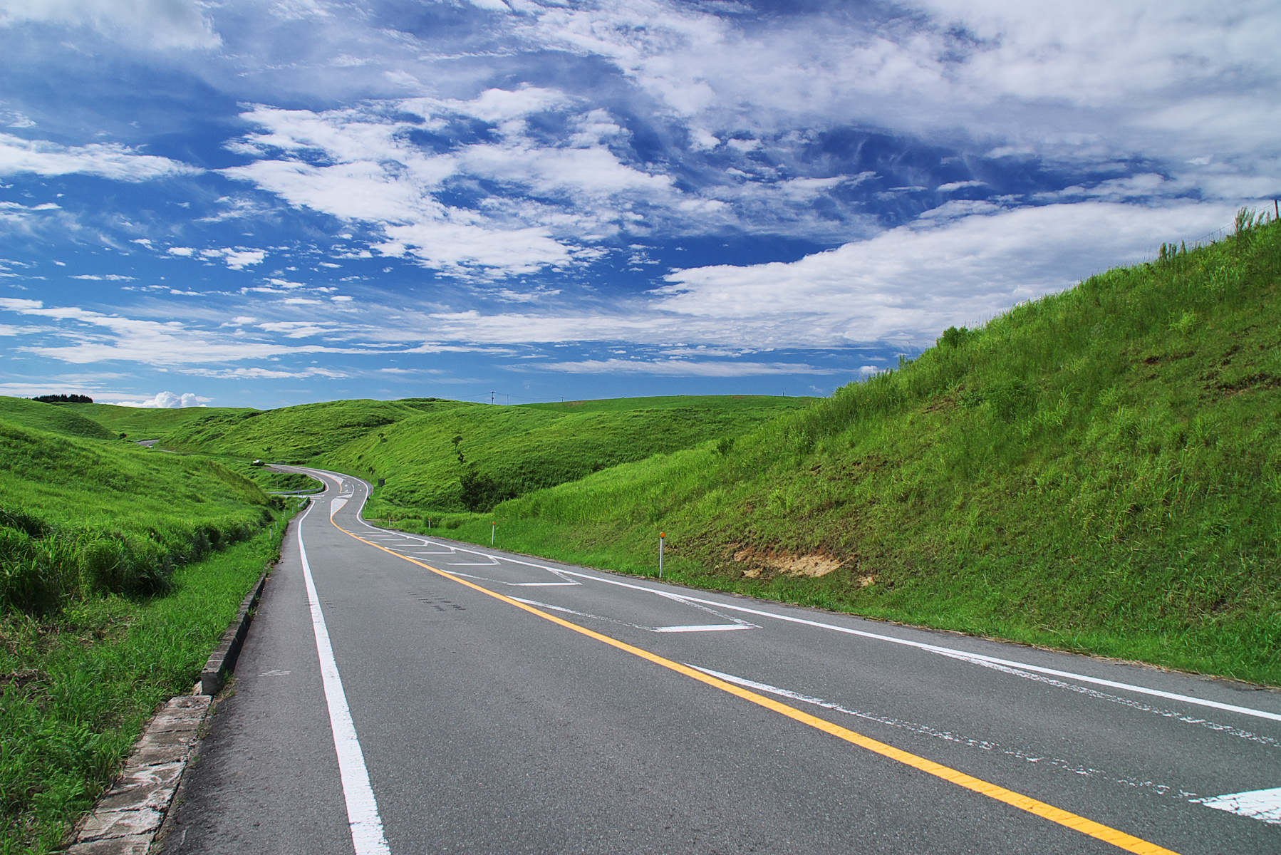 阿蘇ミルクロード